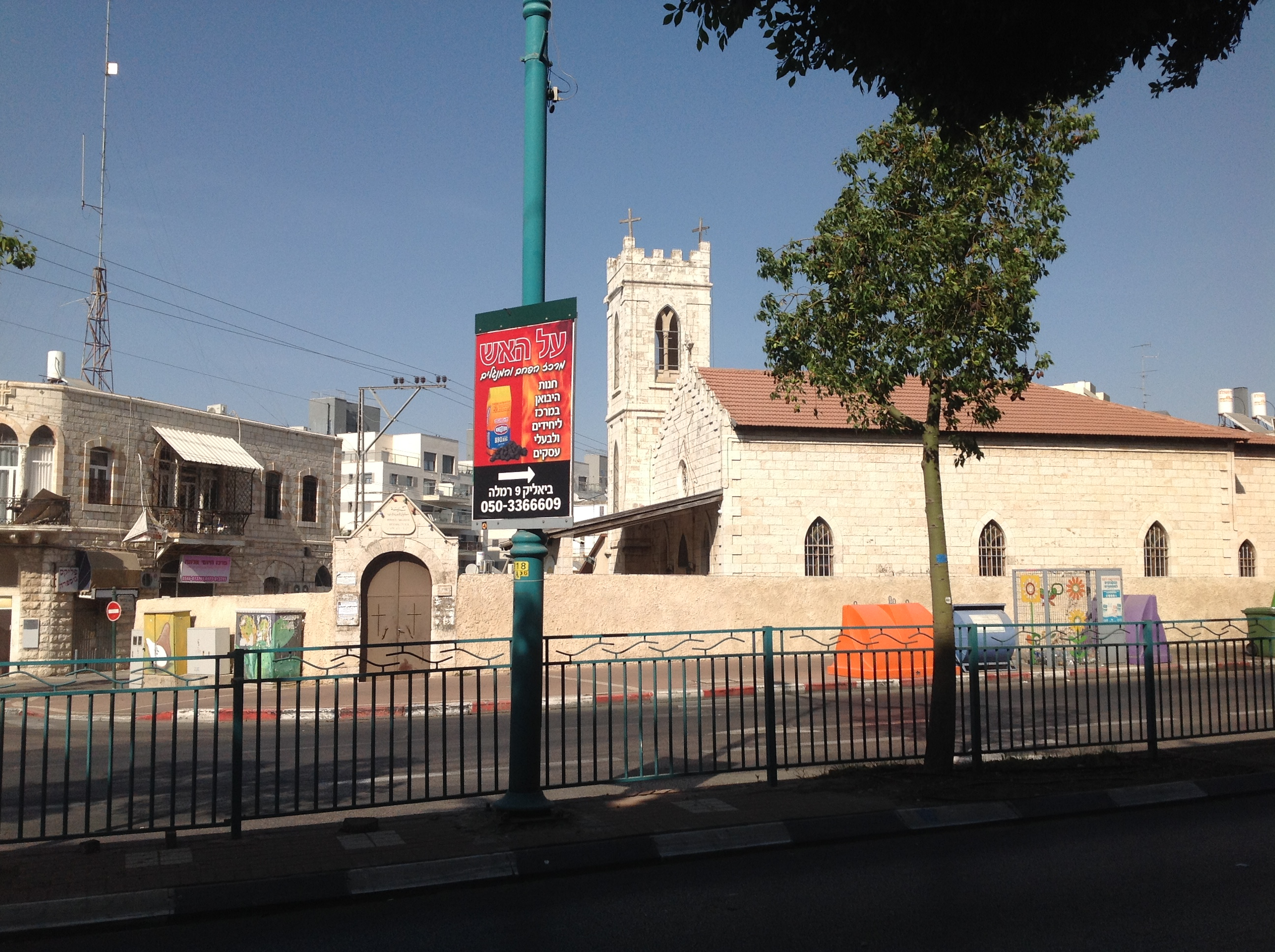 העיר העתיקה של רמלה